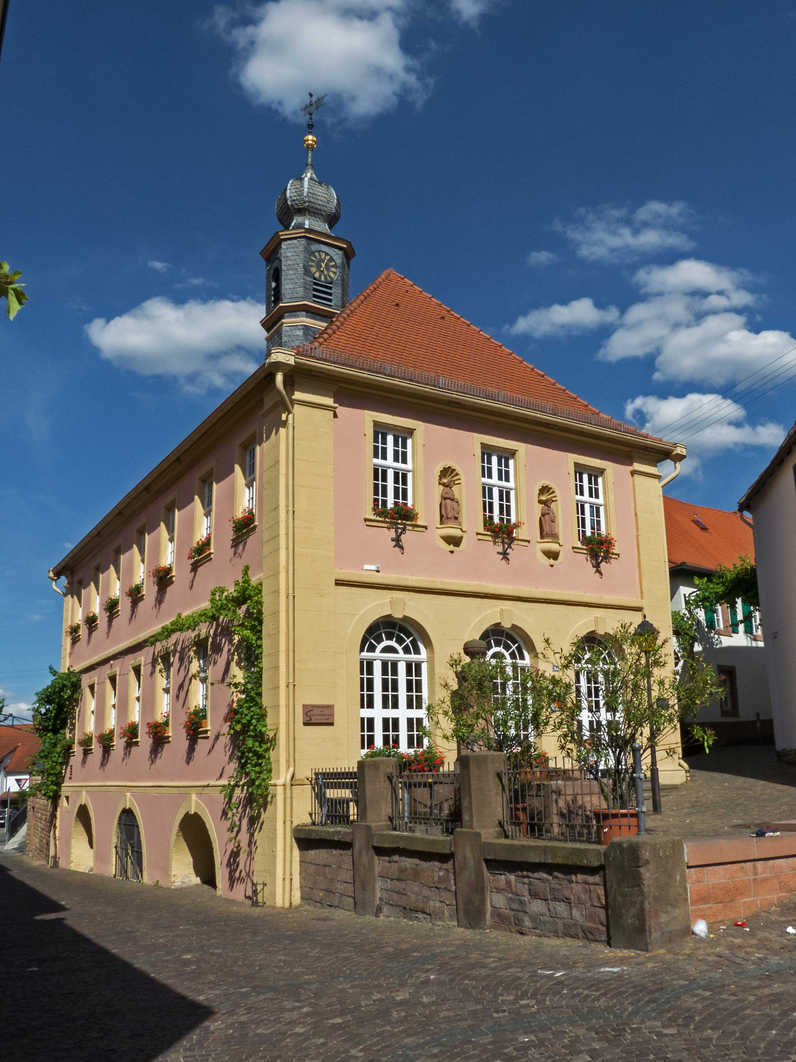 Ehemaliges Rathaus, barocker Walmdachbau mit Uhrturm - P1110115.jpg